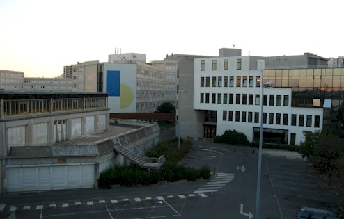 photo perso (Clio64) de l'Université Paris XII de Créteil. Bâtiment d'AES à droite, bâtiment des sciences sociales au centre, arrière de la bibliothèque universitaire à gauche, bâtiment des sciences au second plan à gauche.